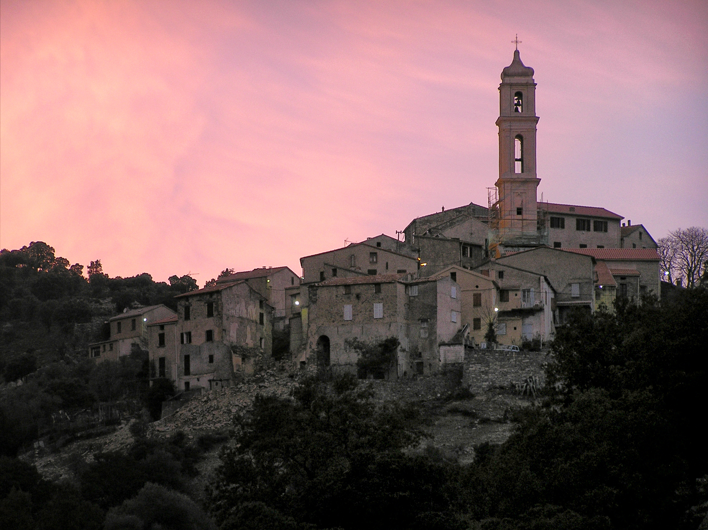 Soveria, Talcini (Haute-Corse) - Vue du village au couchant depuis la route T20